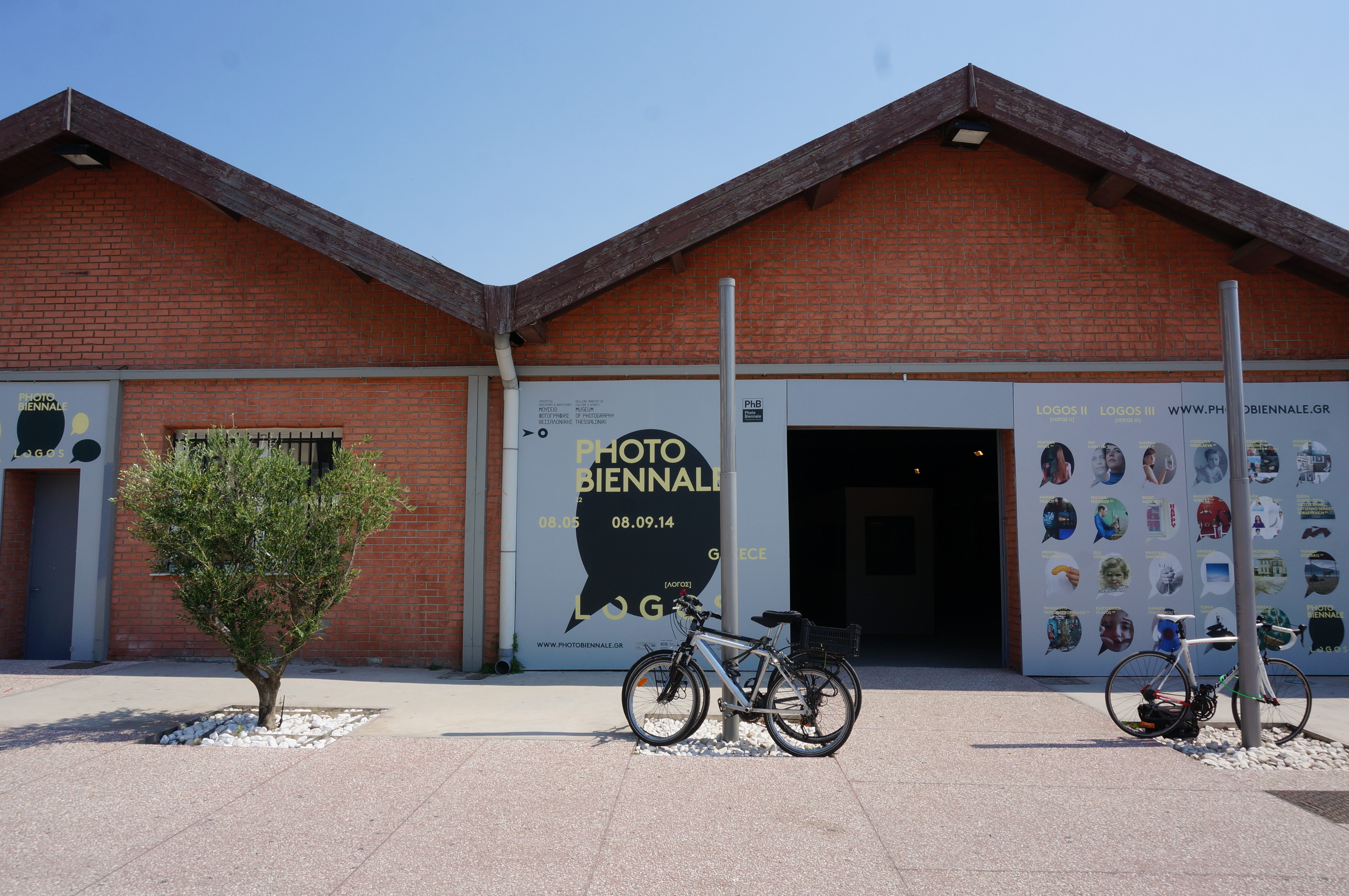 à Salonique.